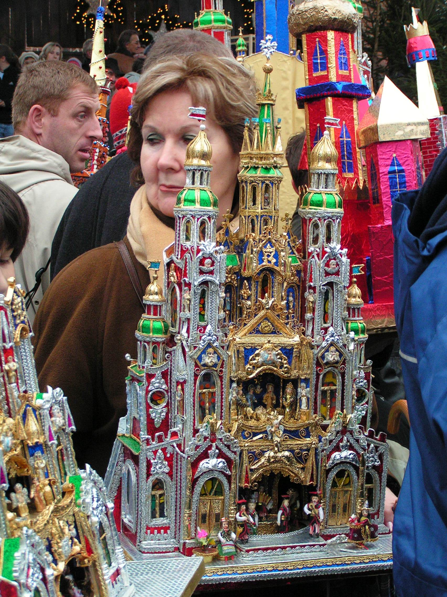 Kraków's Christmas crib at the best Christmas crib competition (Polish language: Szopka krakowska podczas konkursu na najpiękniejszą szopkę na rynku w Krakowie)